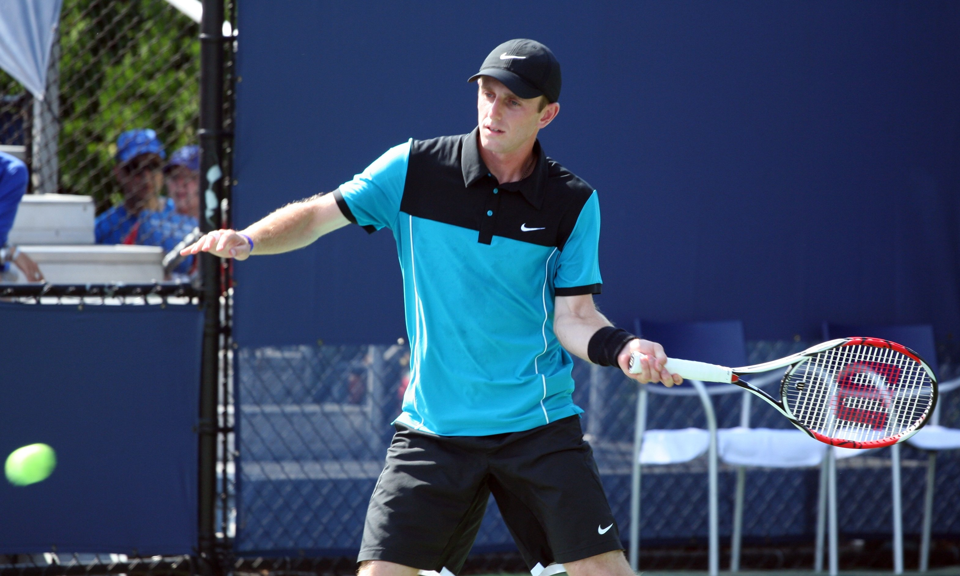 U.S. Open Saturday, Sept. 5, 2009